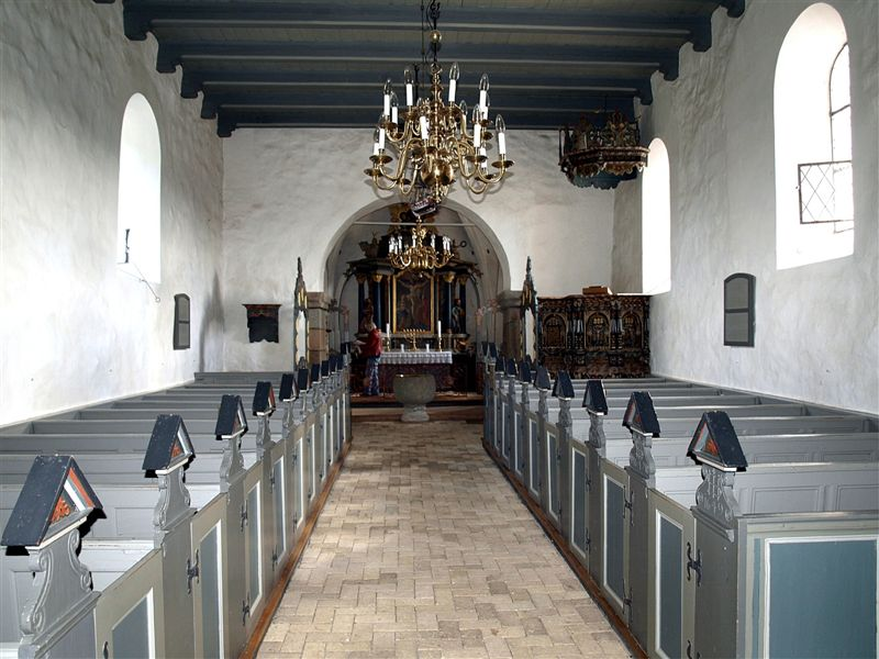 Rødding Kirke, (Viborg Kommune), Kirkerummet set mod øst